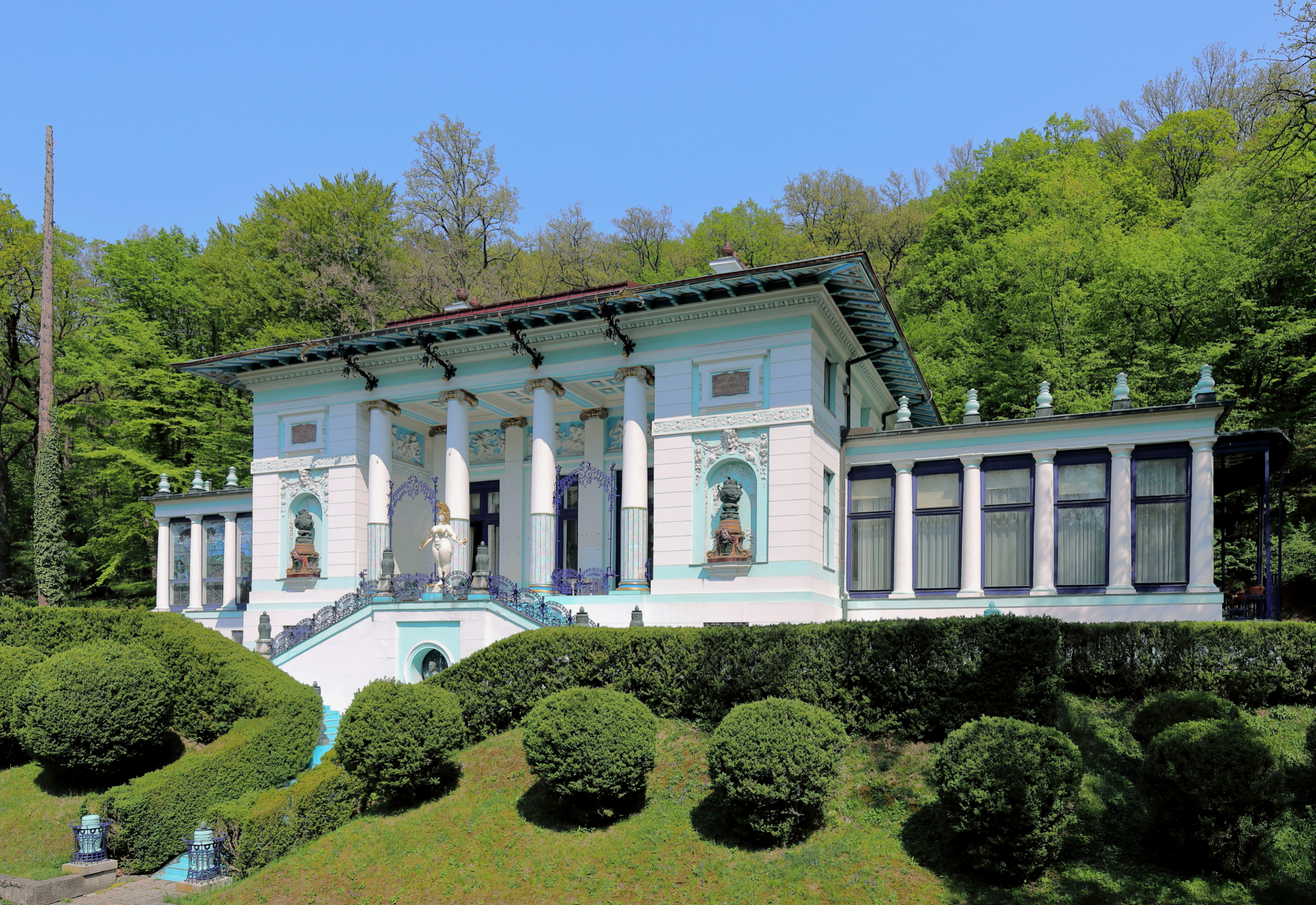 Die Otto-Wagner-Villa an der Adresse Hüttelbergstraße 26 im 14. Wiener Gemeindebezirk Penzing.Die Villa hat der Architekt Otto Wagner von 1886 bis 1888 zum eigenen Gebrauch errichtet. Die linke Pergola wurde 1900 zum Atelier umgebaut. 1911 verkaufte er die Villa und errichtete sich eine neue an der Adresse Hüttelbergstraße 28. Im Jahr 1972 erwarb der Maler Ernst Fuchs das Gebäude und wird (Stand 2018) als Ernst-Fuchs-Museum genutzt.